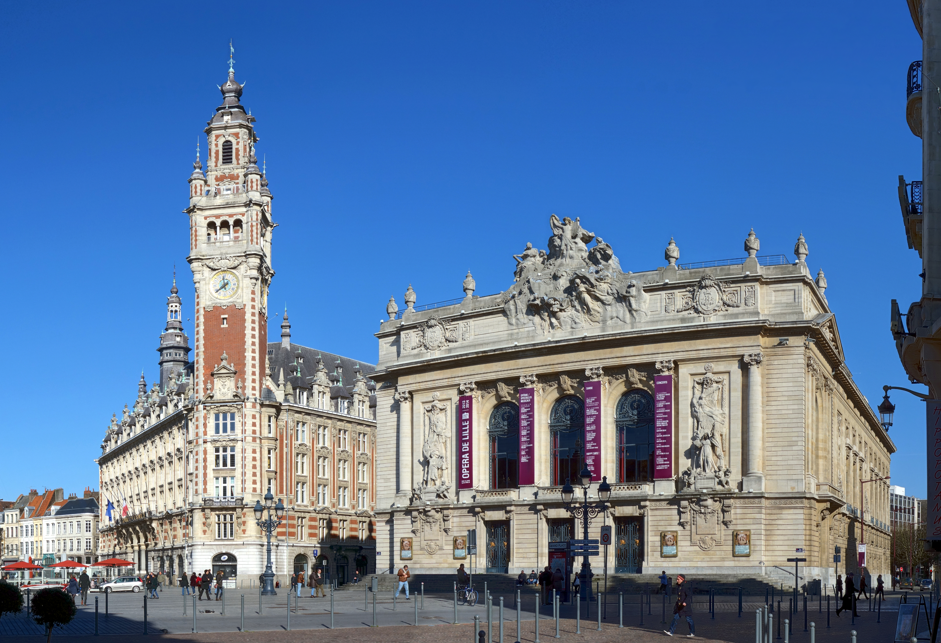 La chambre de commerce et l'opéra, place du Théâtre à Lille.